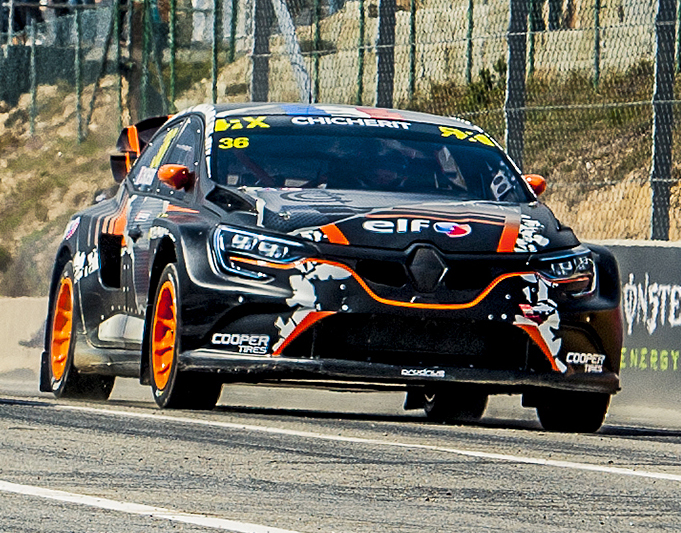 _DSC6226